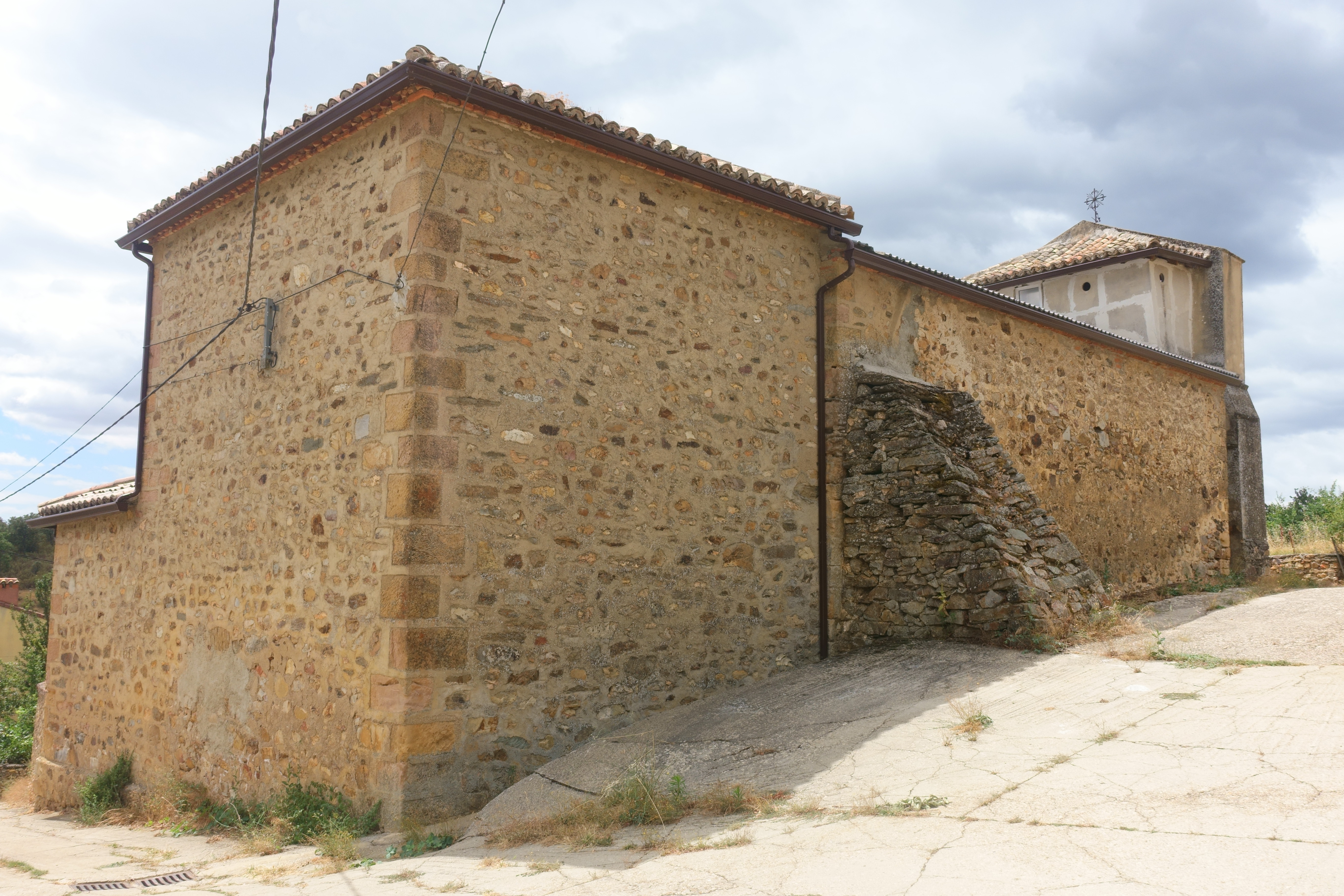 Iglesia de la Purísima Concepción, Arroyo de las Fraguas (Guadalajara, España).